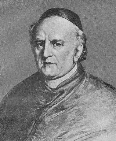 Il classicista e bibliotecario italiano Angelo Mai (1782-1854)